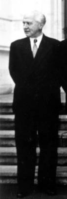 Dr. Hermann Schäfer, Ausschnitt aus dem Gruppenbild zum Kabinett Adenauer II